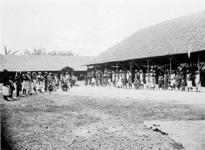 Repronegatief. Tamil-arbeiders uit India in Medan, Deli, Sumatra.